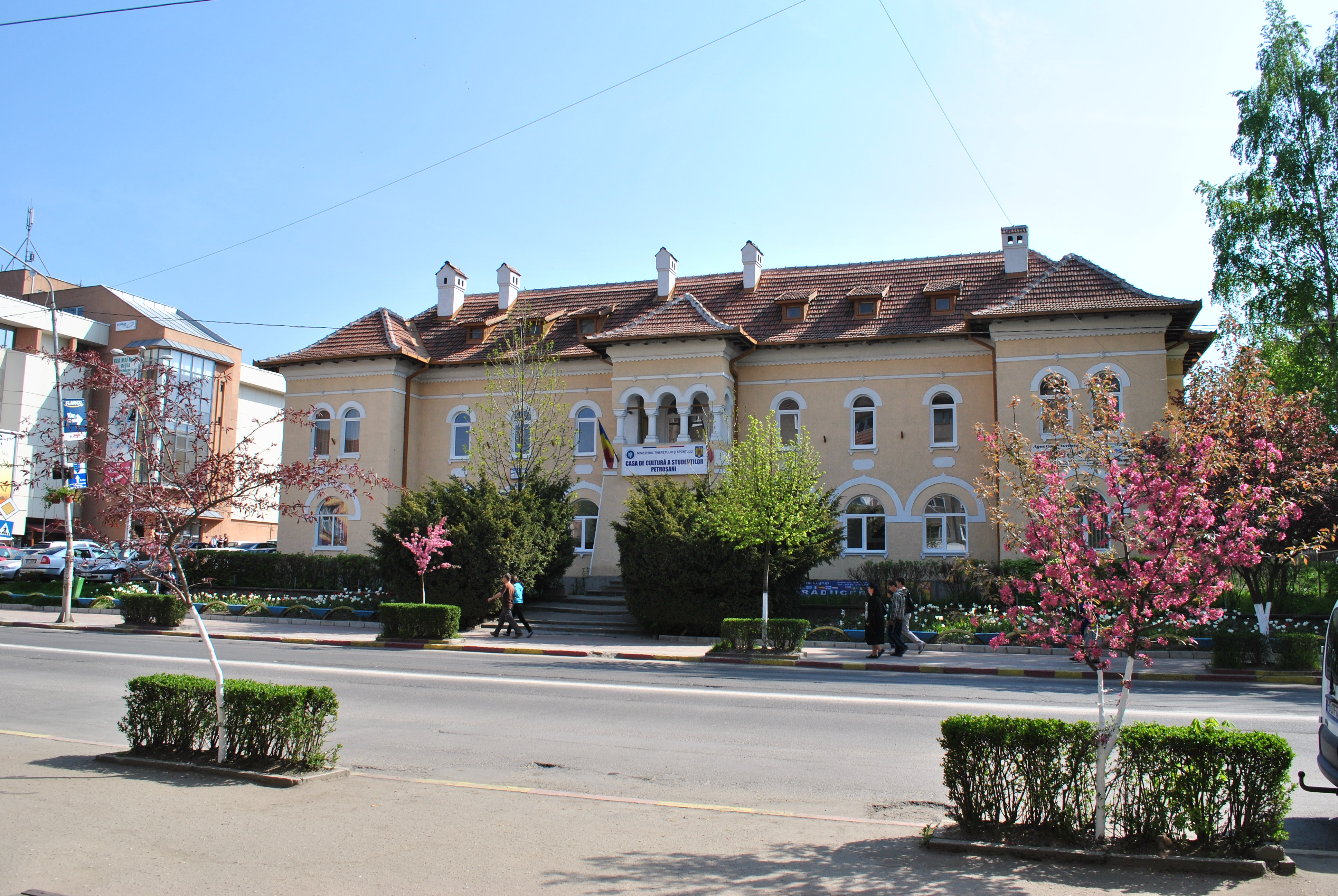 Dispensarul "Principele Mircea", azi Casa de cultură a studenților, 1925